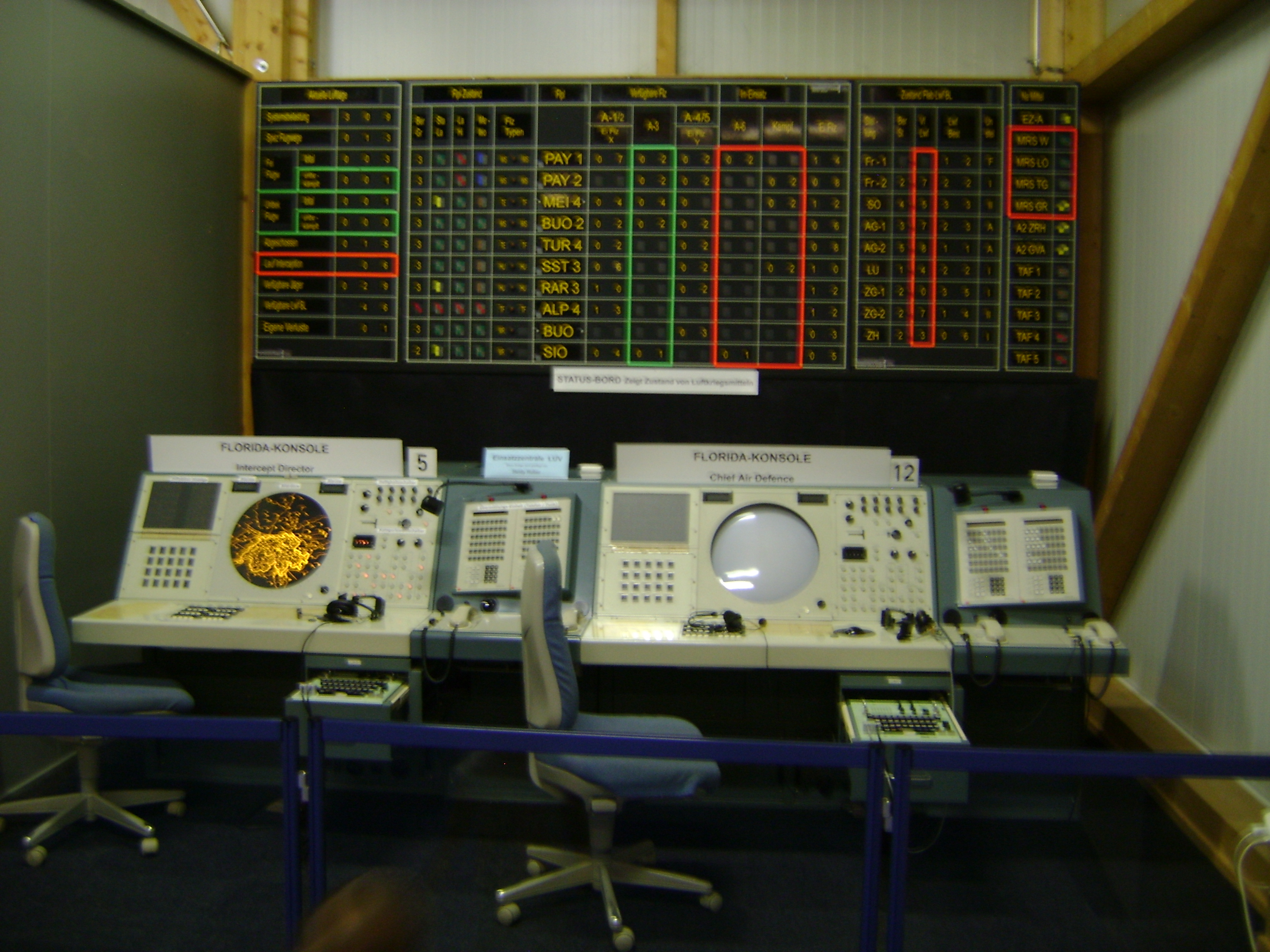 FLORIDA EZ